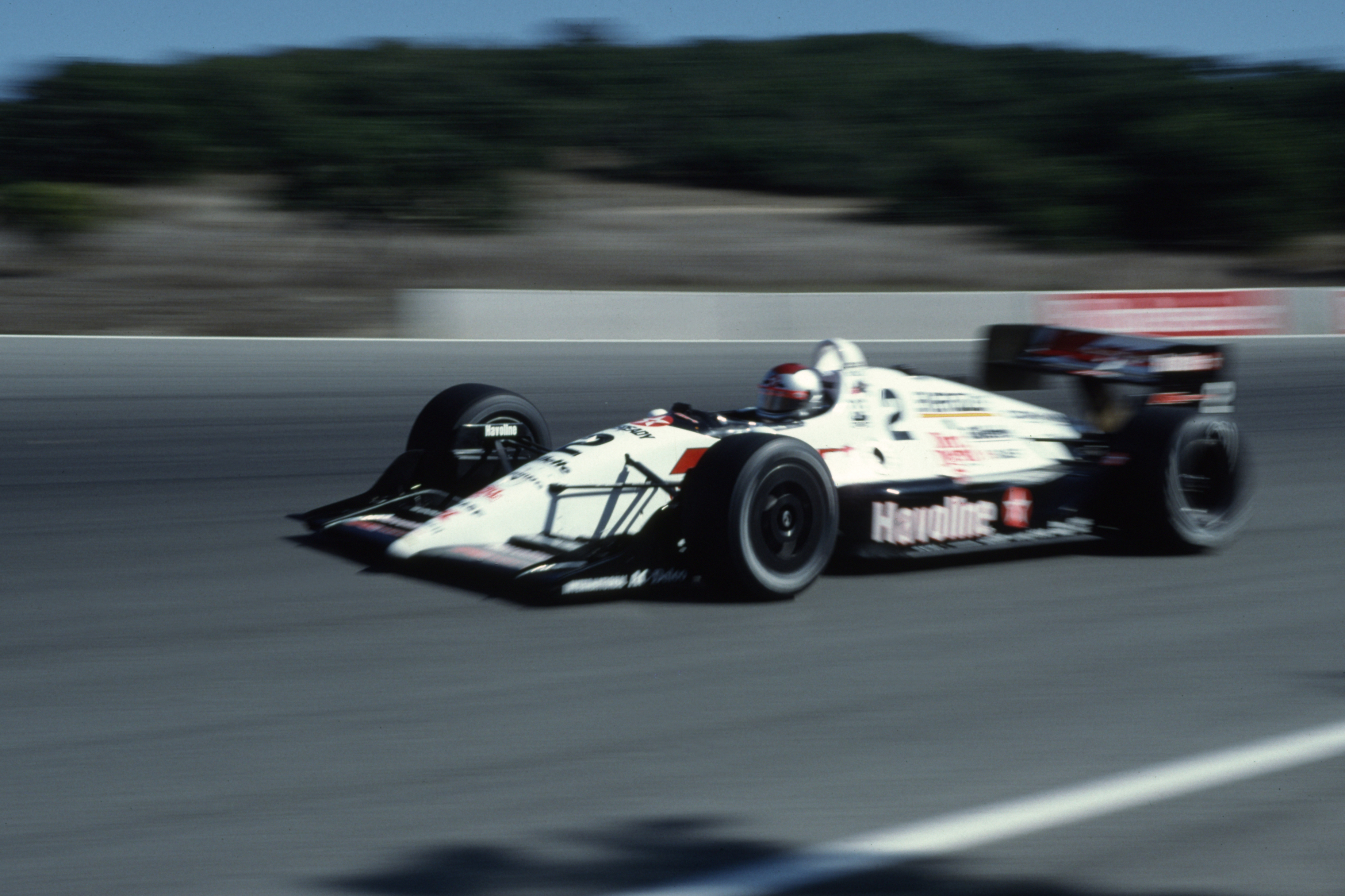 Michael Andretti at Monterey